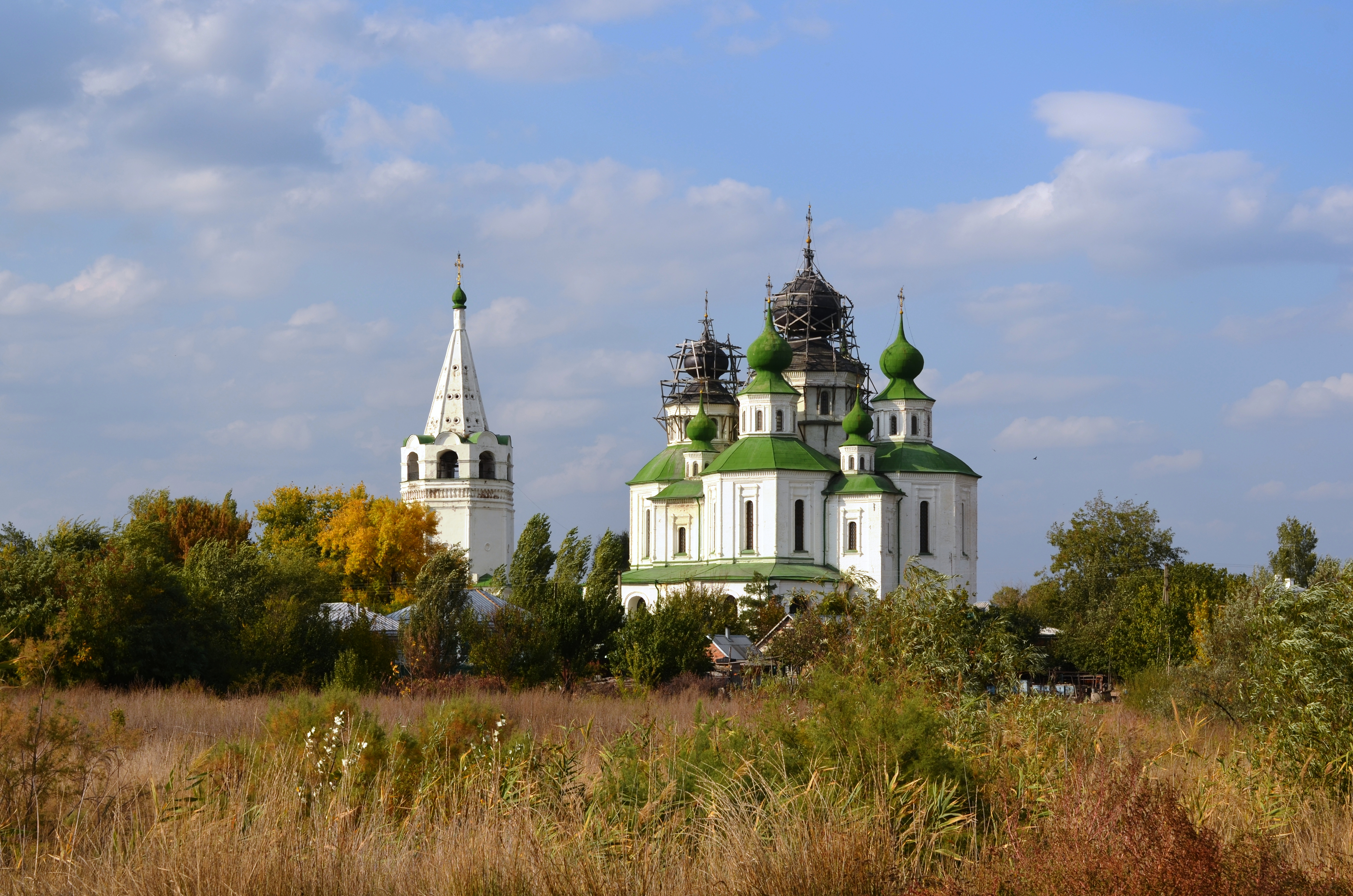 Ансамбль войскового Воскресенского собора (собор и колокольня) (Ростовская область, Аксай, Советская улица)